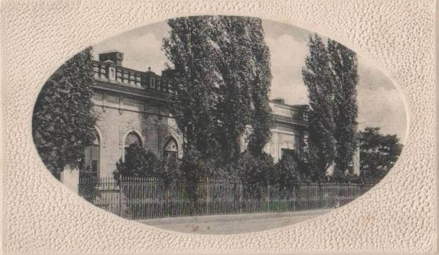 Бендерская еврейская больница 1889 года